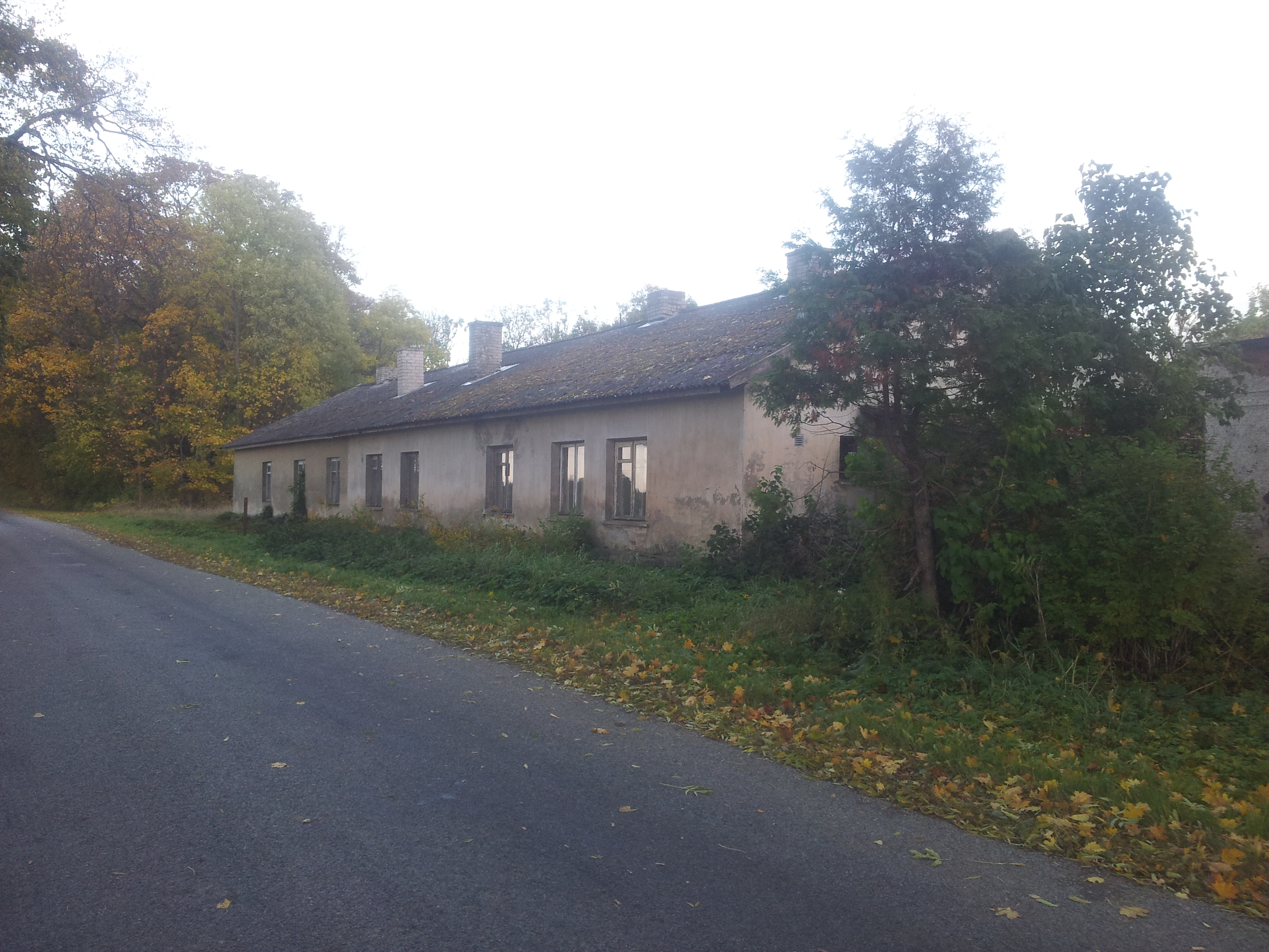 Aaspere mõisa aednikumaja